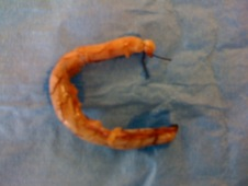 Appendice inlammatoire. Pièce opératoire.